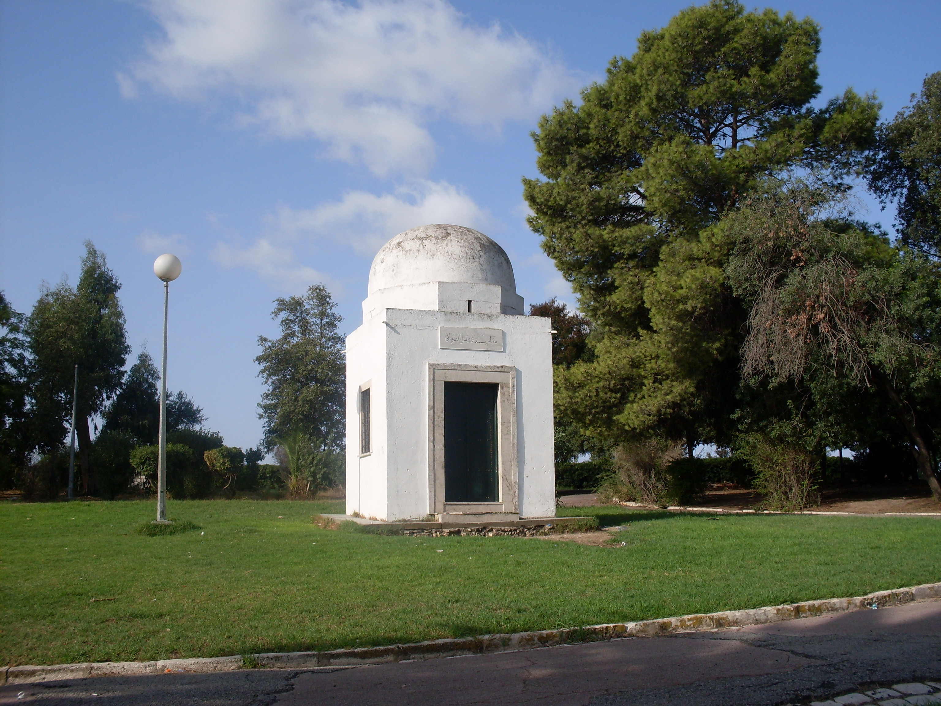 Mausolée Sidi Ali Gorjani